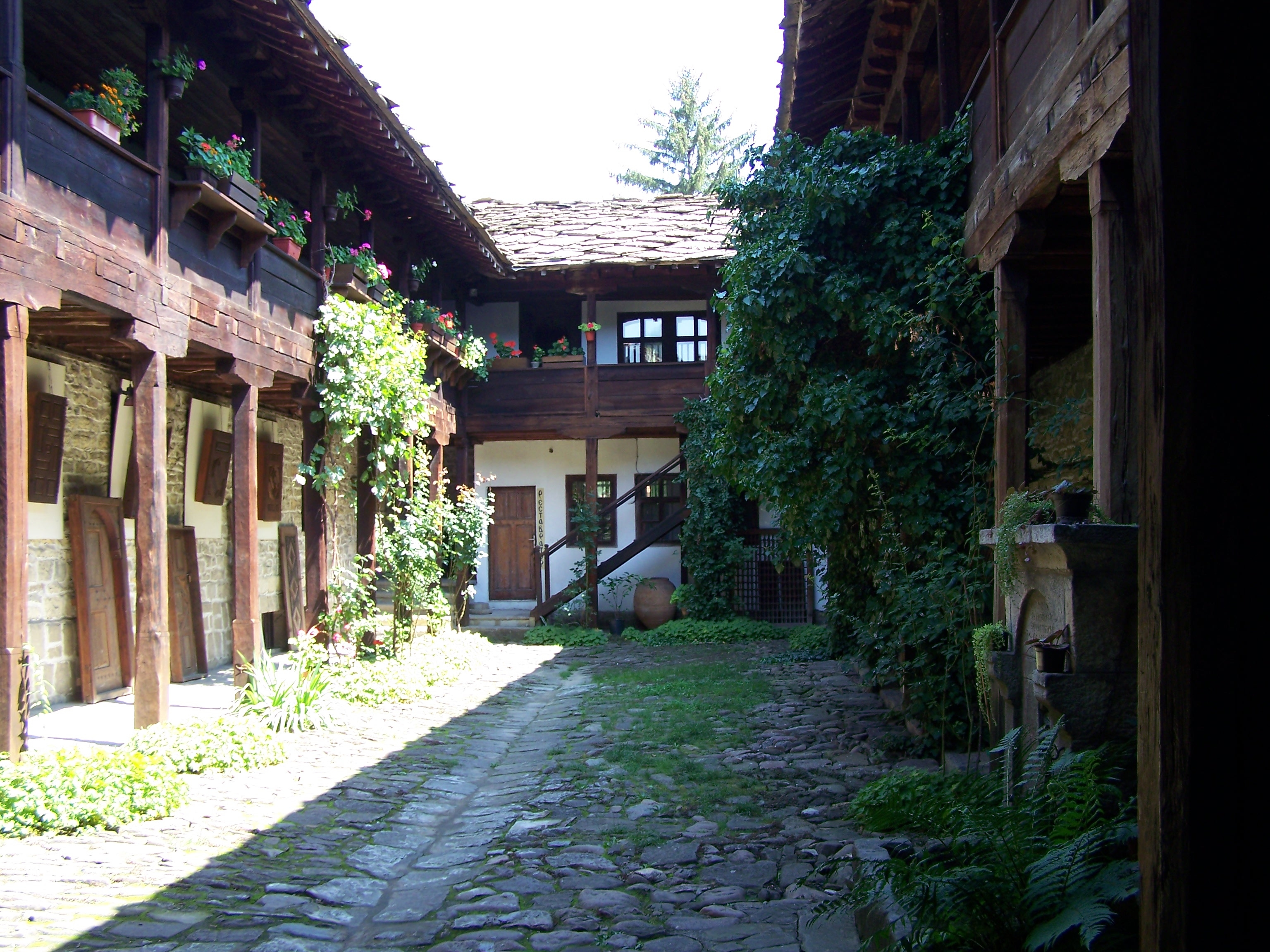 Дворът на Старото школо в Трявна